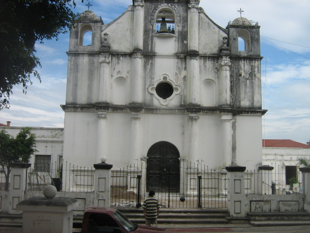 Iglesia de Jutiapa.